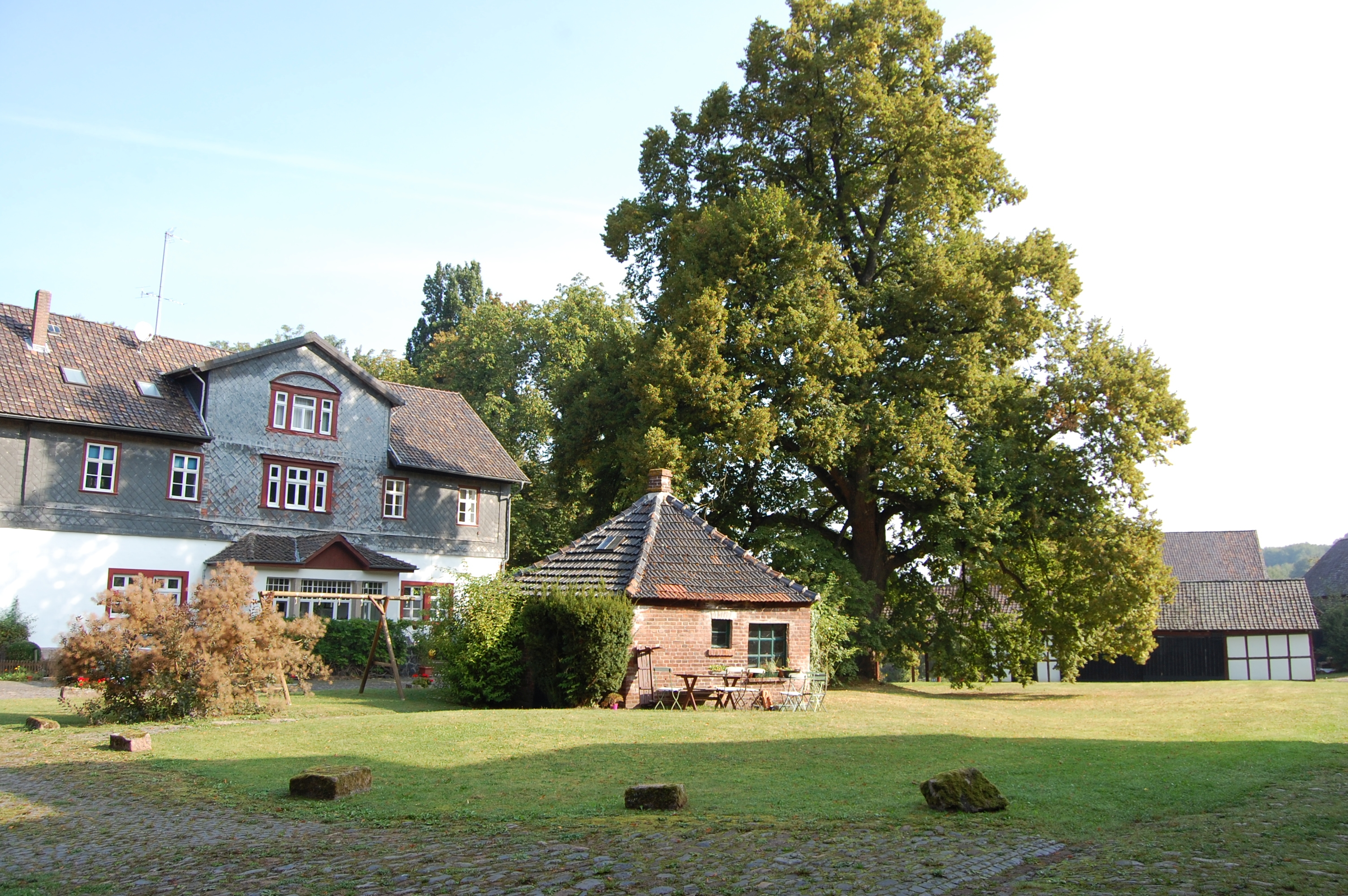 Hof Fahrenbach, Gemarkung Dohrenbach, Stadt Witzenhausen. östlicher Kaufunger Wald